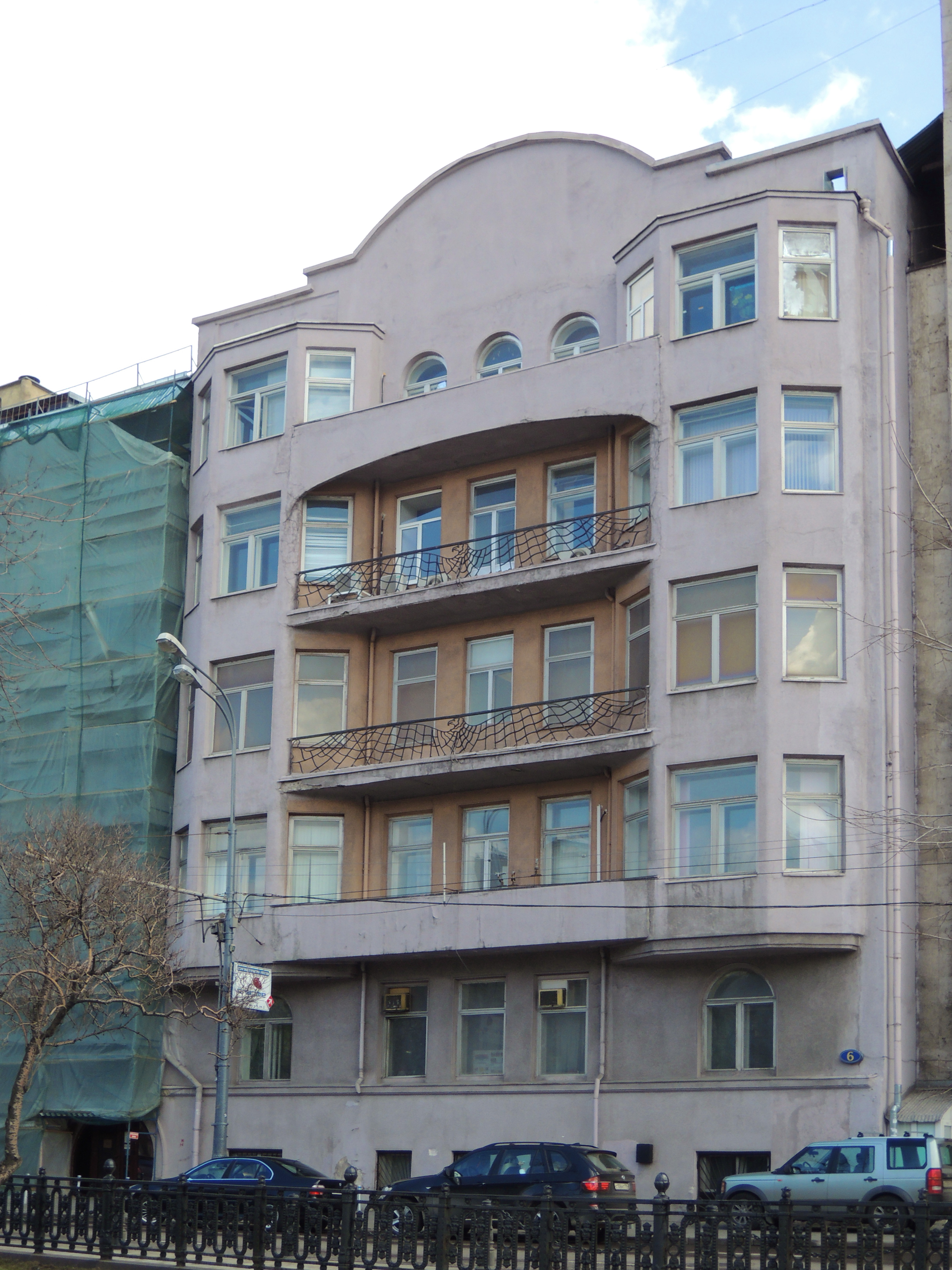 Тверской бул., 6. Бывш. доходный дом Коробковой. Построен в 1903 г. архитектором Мейснером в стиле модерн с богатым декором. Известен тем, что в 1906-07 гг. здесь находились квартиры и контора знаменитого издательства М.В. и С.В. Сабашниковых. В октябре 1917 г. дом, подожженный артиллерийским снарядом, начисто выгорел. Восстановлен и переделан в середине 1920-х гг. 1902, архитекторы А. У. Зеленко и А. Ф. Мейснер